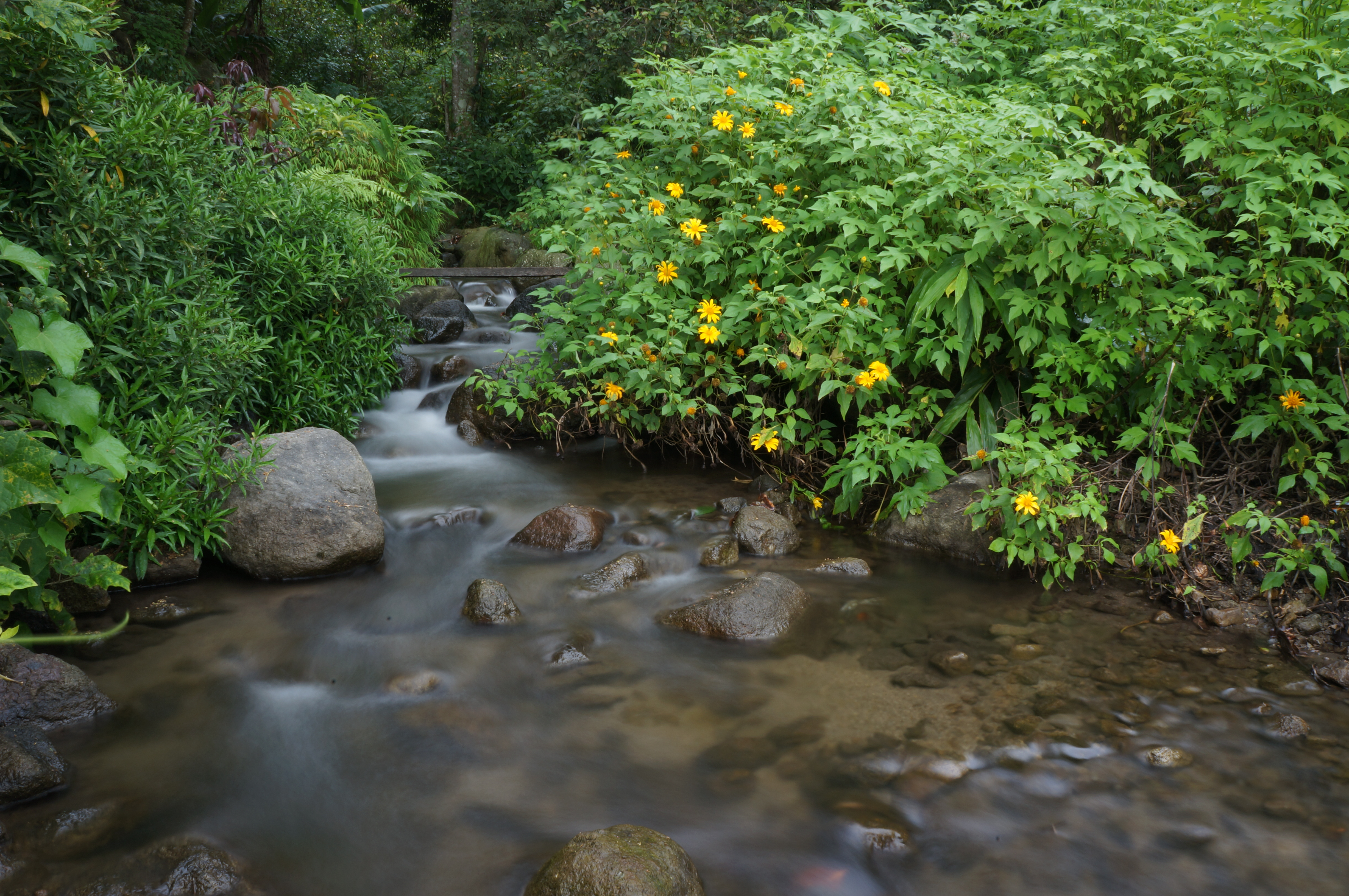 Sungai di bahal bahal yang bermuara ke Danau Toba